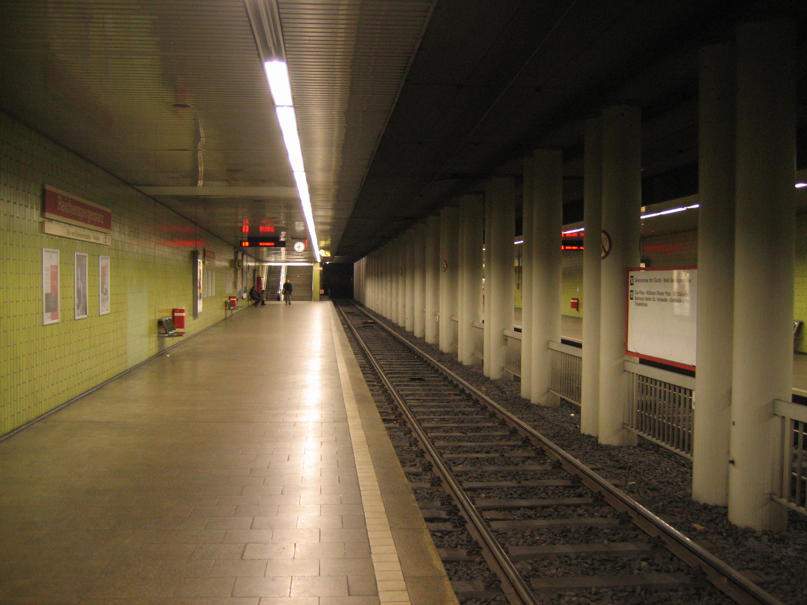 U-Bahn-Station Reichenspergerplatz der Stadtbahn Köln